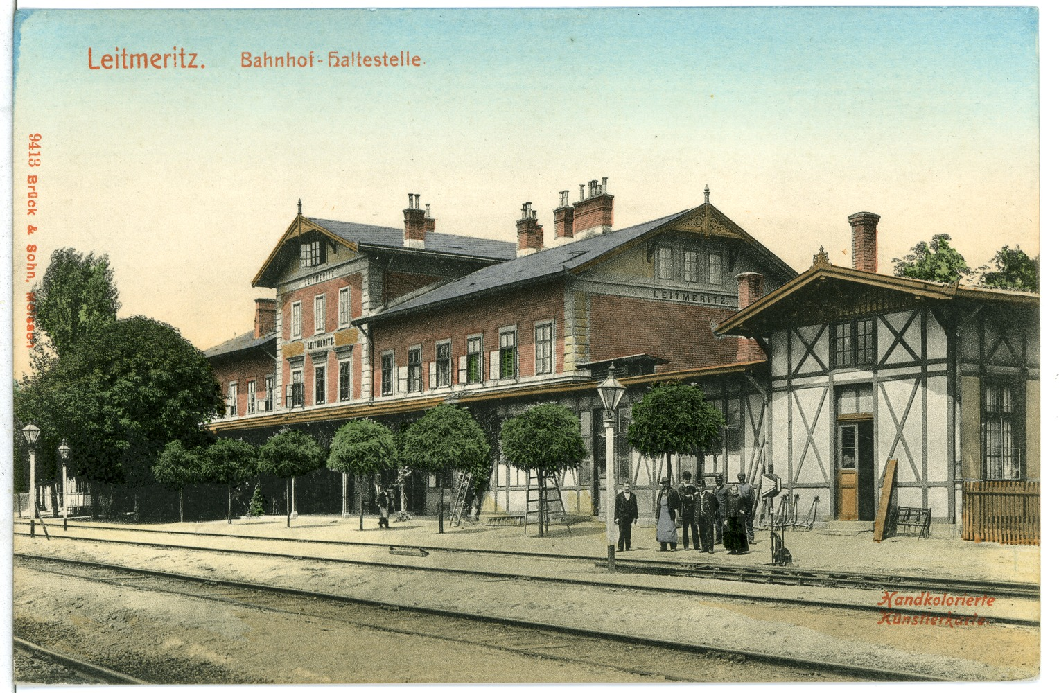 Leitmeritz; Bahnhof Haltestelle